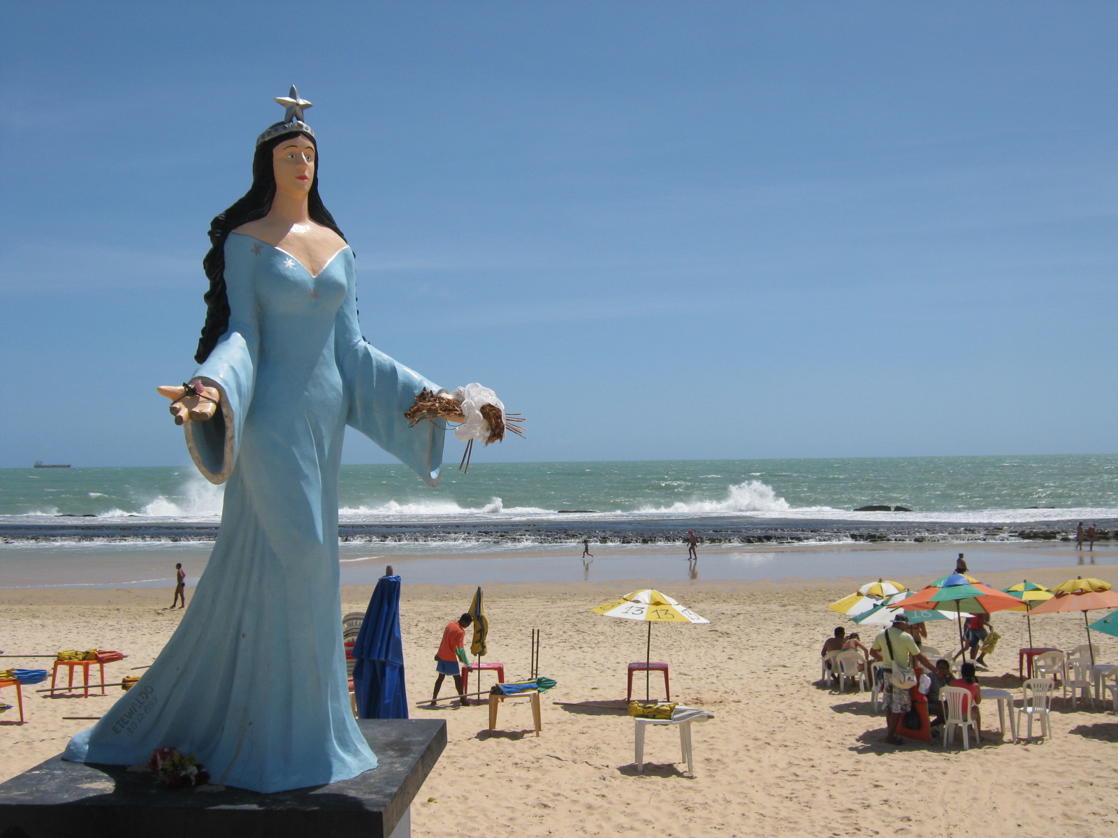 Estátua de Iemanjá na Praia do Meio, em Natal, Brasil.